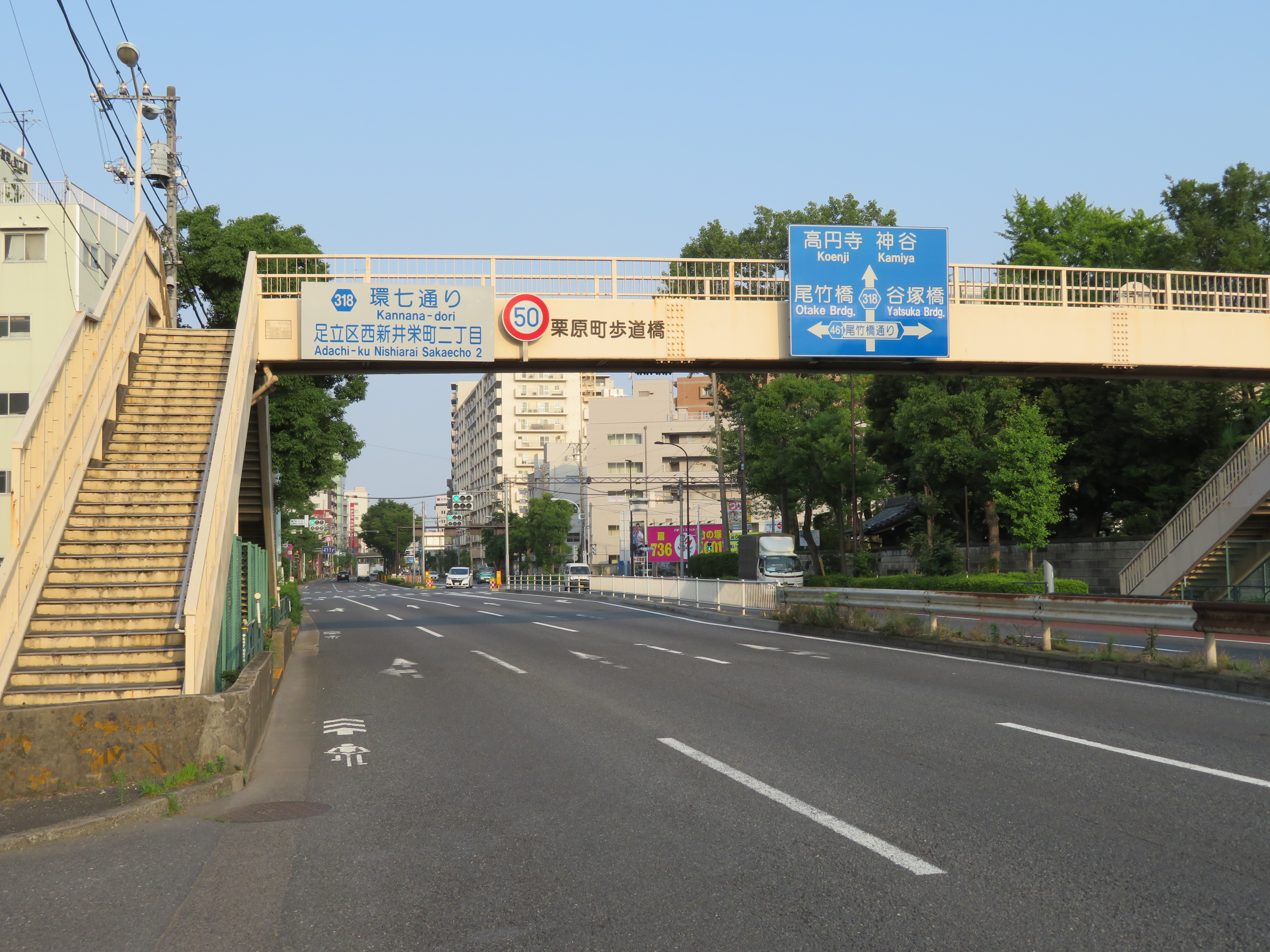 東京都道318号線（環状七号線）足立区西新井栄町二丁目付近（鹿浜橋方面を撮影） Canon PowerShot SX720 HS